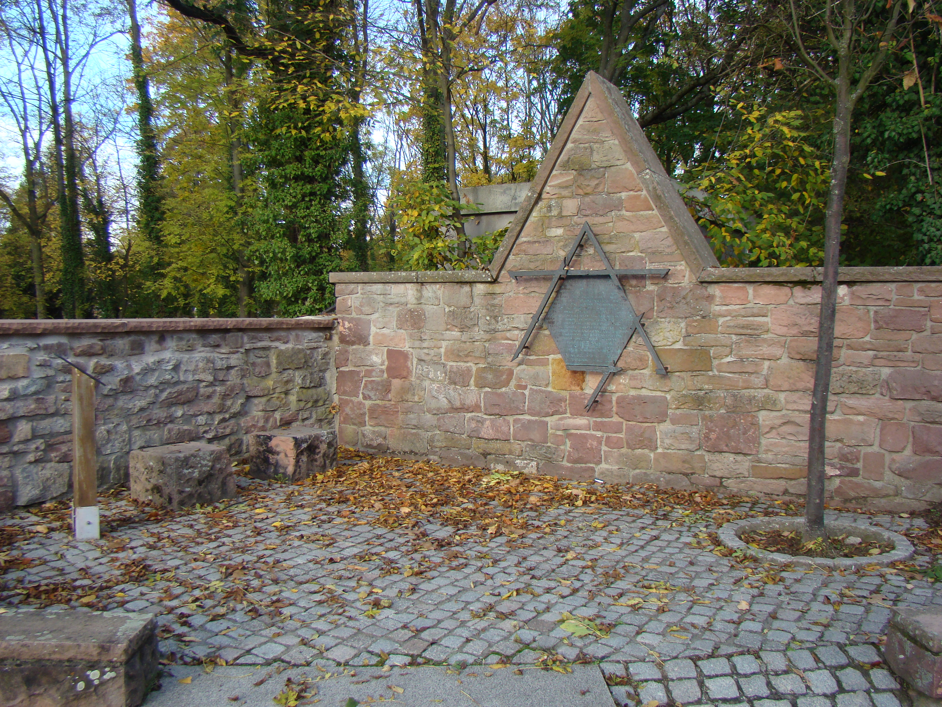 Jüdischer Friedhof in Wiesloch, Ehrenmal